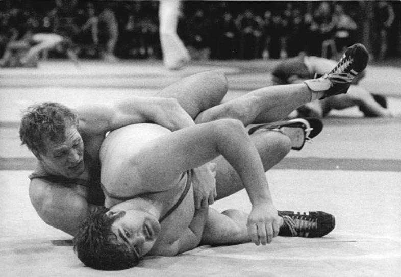 Andreas Schröder, René Schiekel ADN-ZB Kluge 2.2.85 Leipzig: DDR-Meisterschaften im Ringen - Klassischer Stil Andreas Schröder (SC Motor Jenau, links), in der Klasse über 100 kg Titelverteidiger im Freistil, kämpft in beiden Stilarten. In der ersten Runde des klassischen Stils gewann er gegen René Schiekel (Dynamo Luckenwalde) durch technische Überlegenheit.